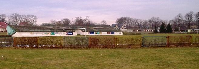 Stadion w Łobzie